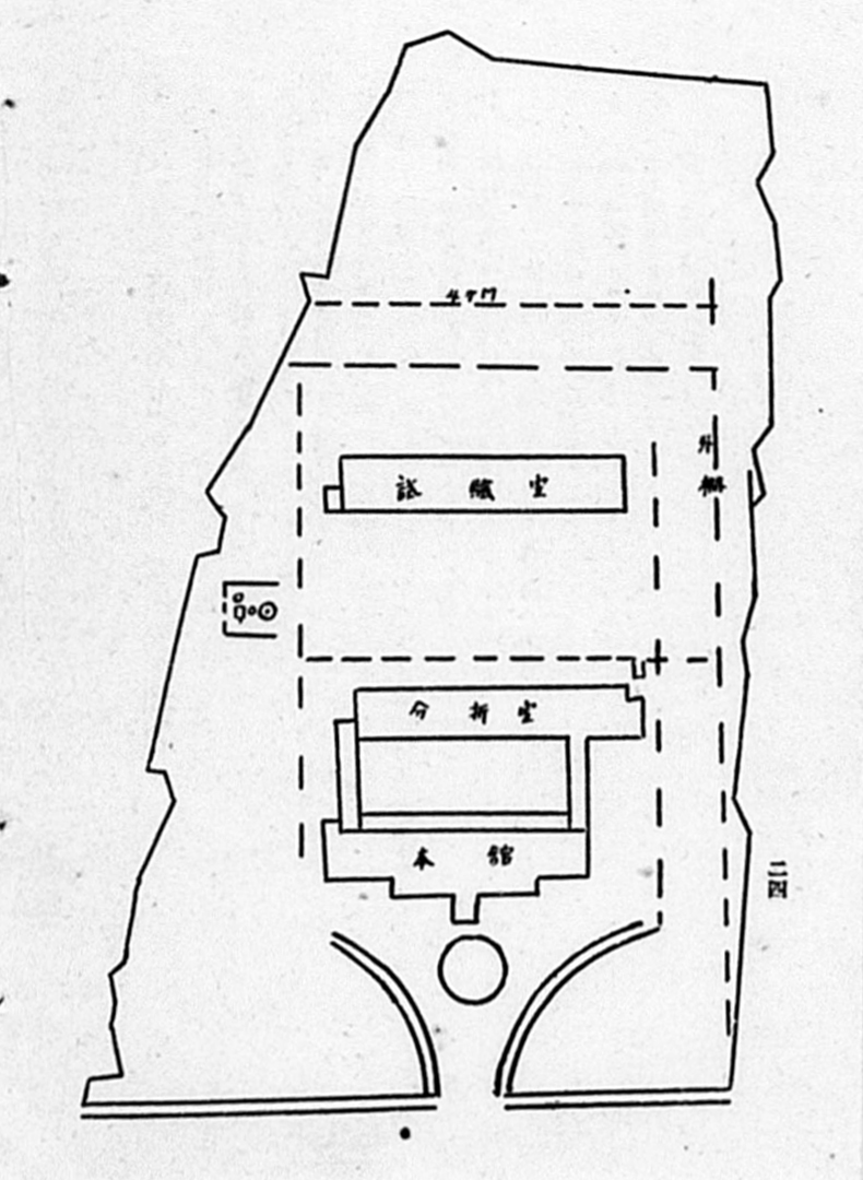 中文（台灣）: 台中州工業試驗所，現為台中市南區標檢局台中分局